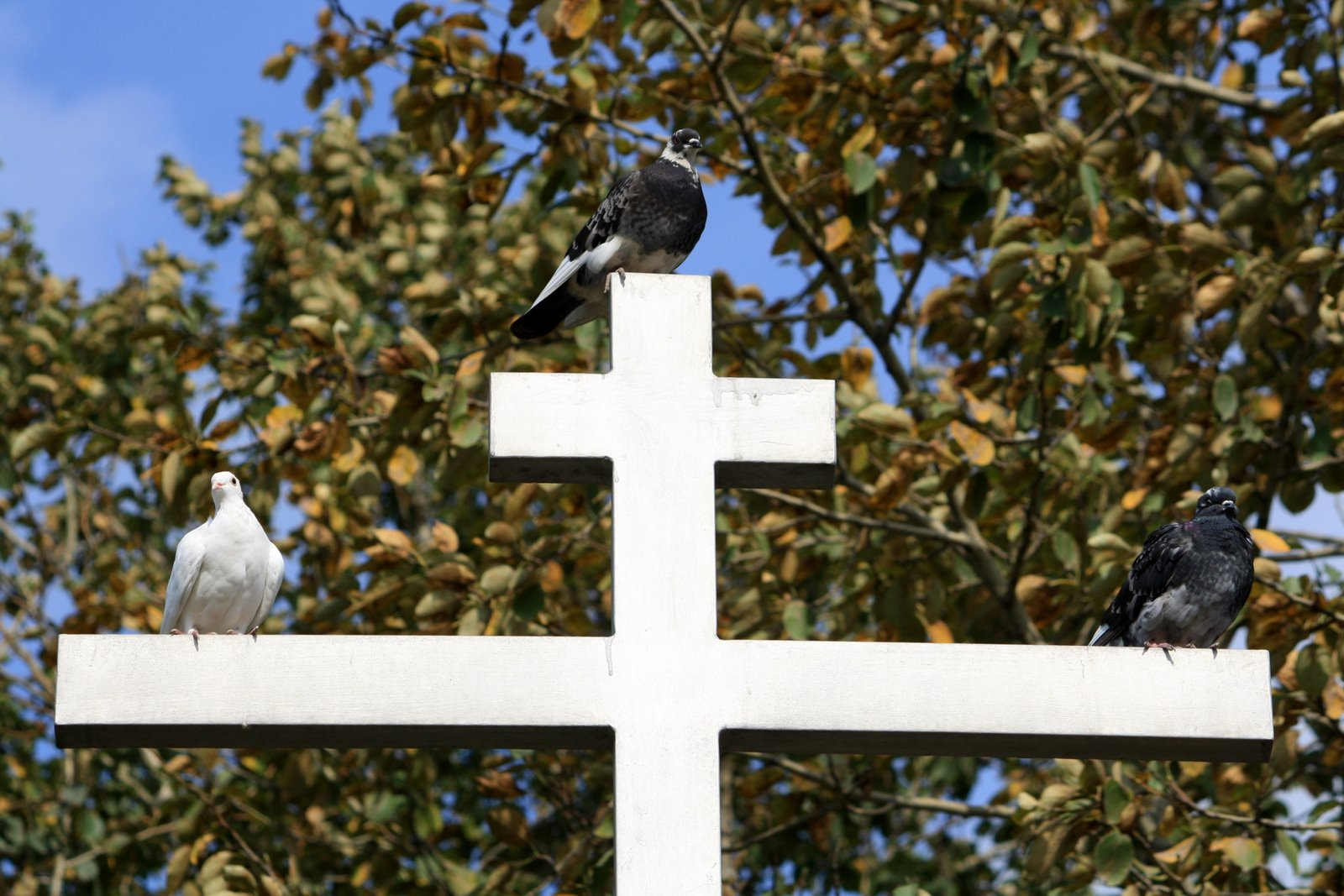 “Святая троица”